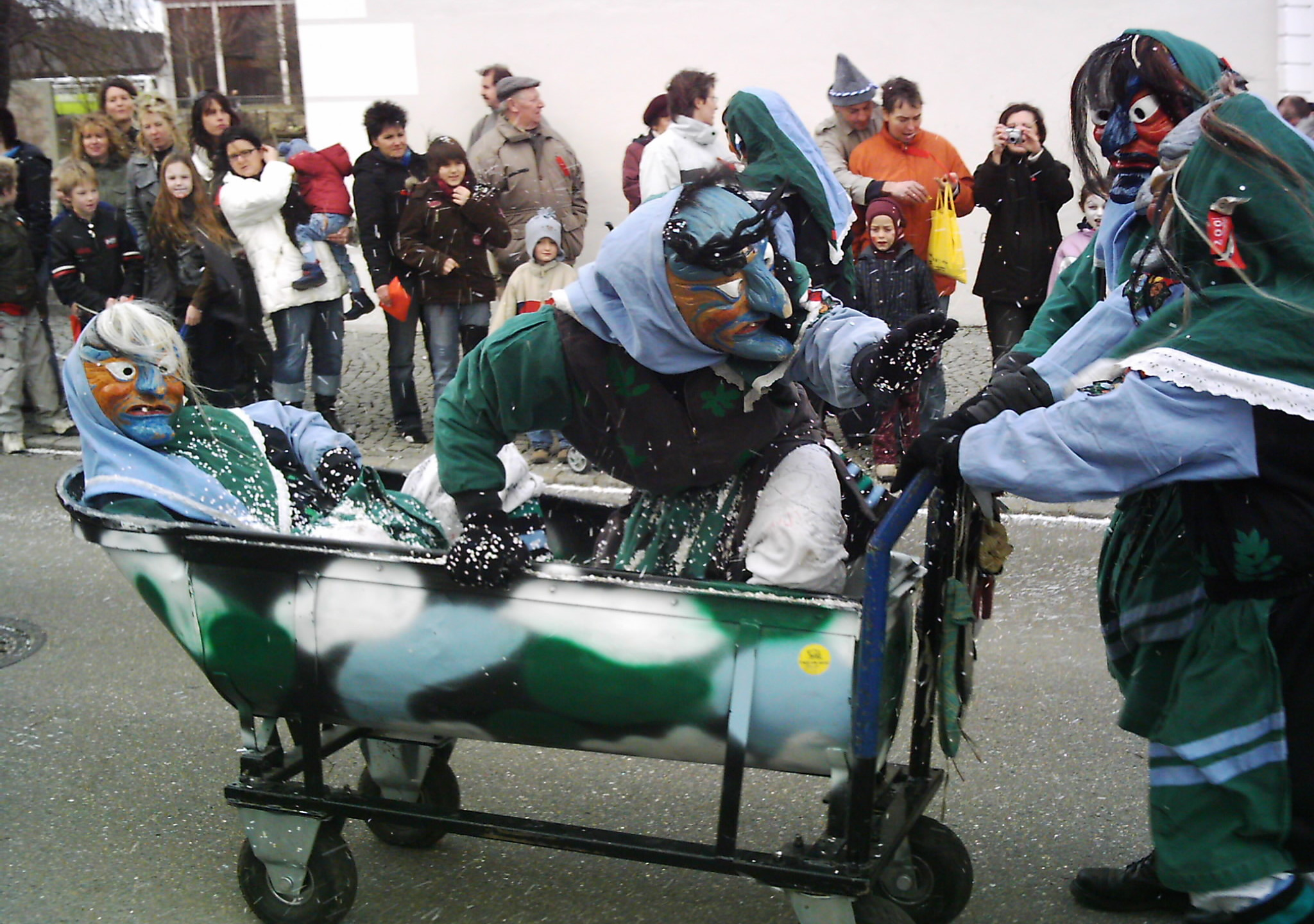 Fasnetsumzug Tannheim: Narrenzunft Stadtbachhexen Memmingen 1996 e. V., Narrenfigur: „Stadtbachhexe“